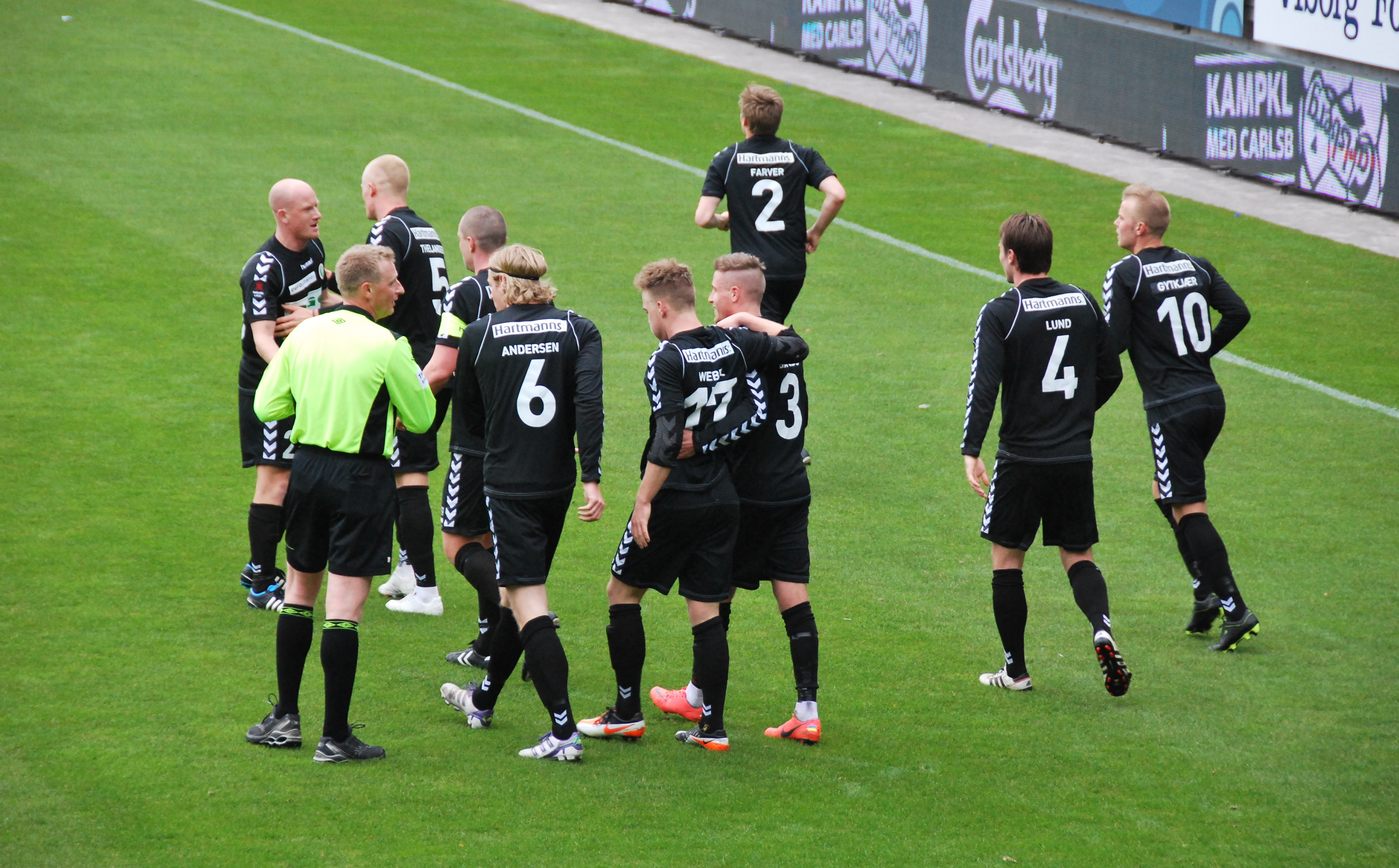 Spillere fra Akademisk Boldklub. Her efter Frederik Weibels scoring i en 1. divisionskamp mod Viborg FF på Viborg Stadion.